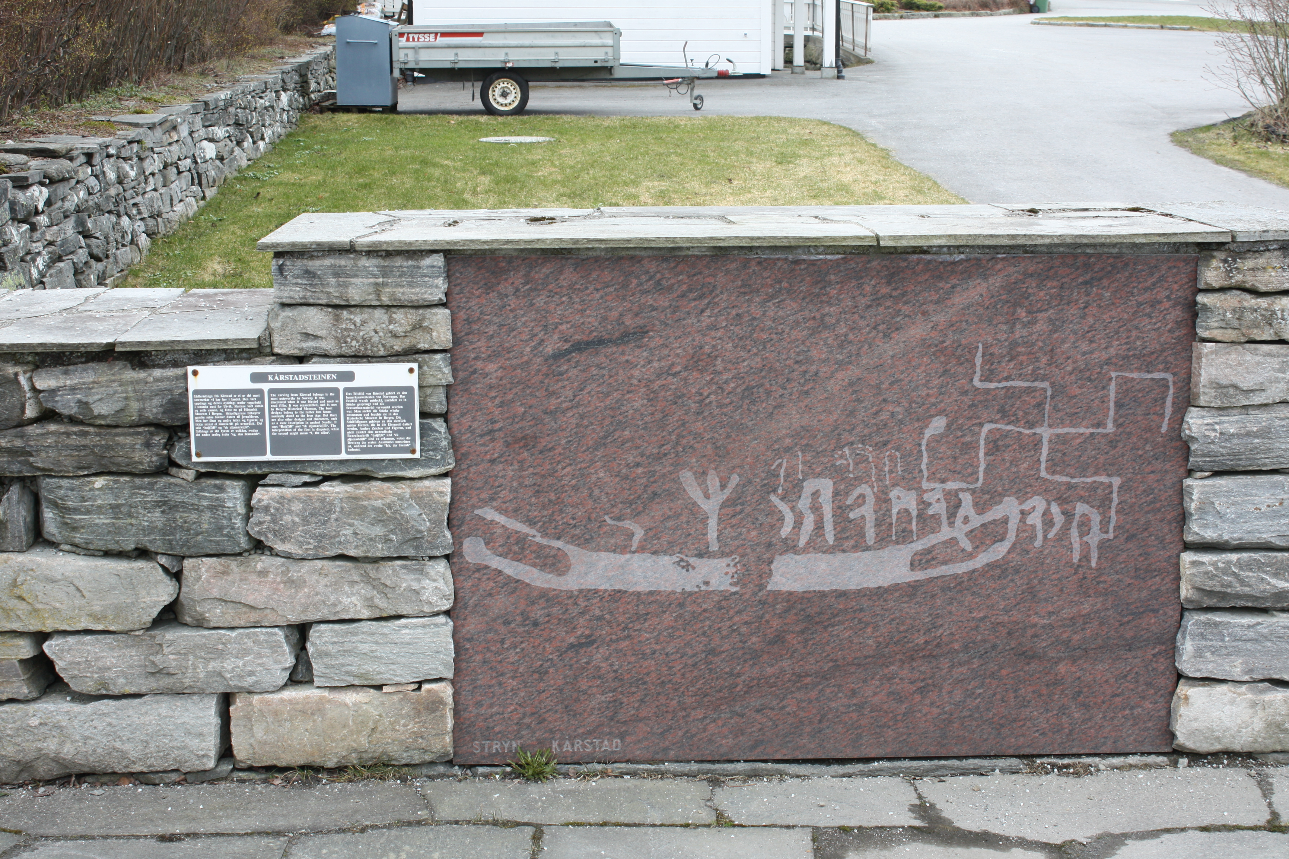 Helleristningsstein fra folkevandringstiden. Kopi. Originalen er i Bergen museum.